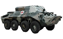 БММ-70 предназначена для обслуживания и транспортирования тяжелораненых из труднодоступных районов, зон аварий, стихийных бедствий и боевых действий. Машина оборудована силовой установкой из двух бензиновых двигателей, запас хода 400 км. БММ-70 способна транспортировать: - 4 тяжелораненых на носилках и 5 легкораненых сидящих, при этом у медперсонала (врач, санитар) остается возможность оказывать раненым помощь; - 6 тяжелораненых на носилках, которым уже оказана первая медпомощь, и 1 легкораненого сидящего; - 2 тяжелораненых на носилках и 9 легкораненых сидящих. Для погрузки раненых у машины есть специально погрузочно-разгрузочное устройство, размещенное над машинным отделением.